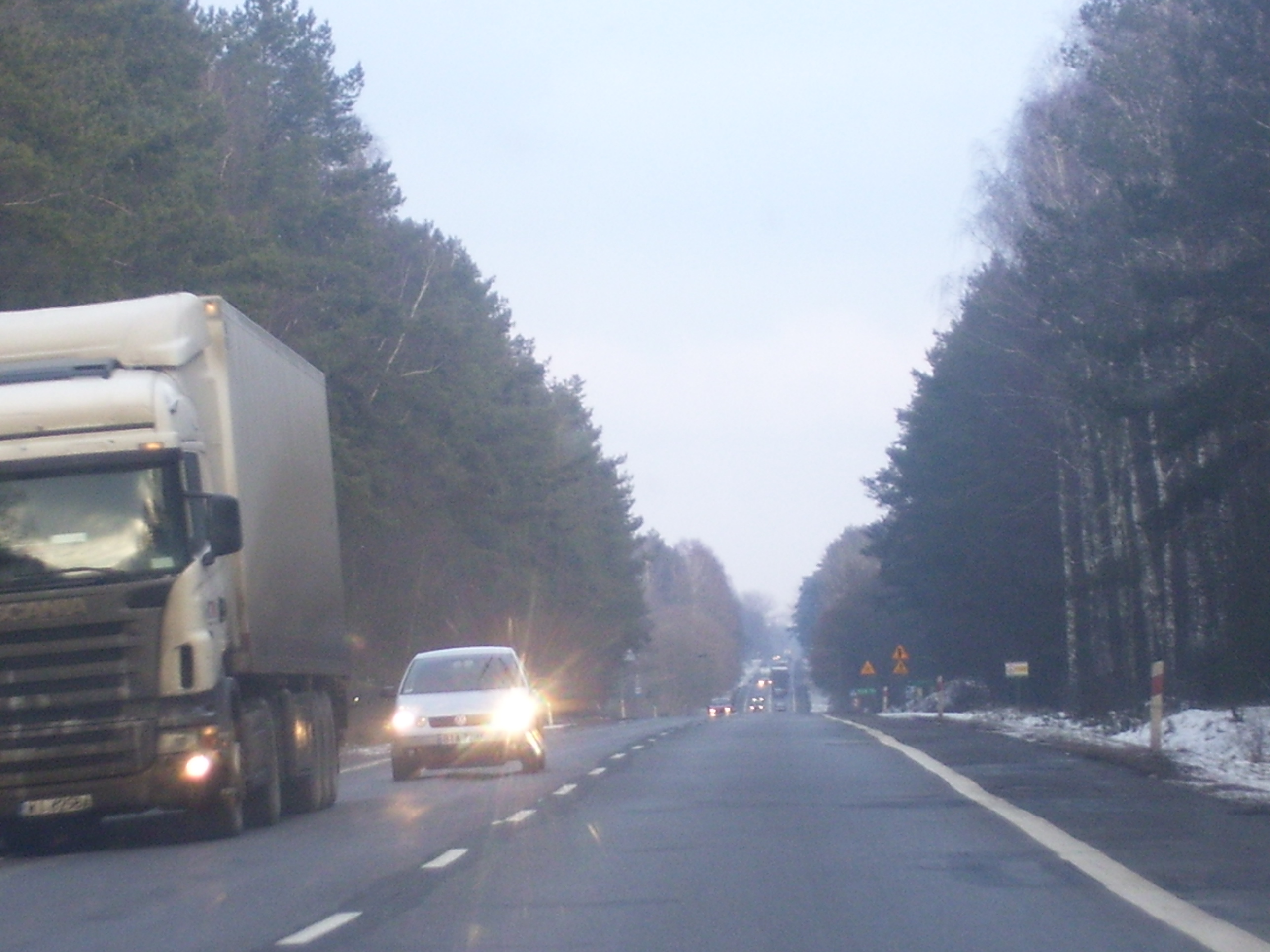 DK 8 koło Przyjm w lesie